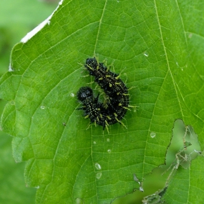 Vanessa indica(アカタテハ),larva